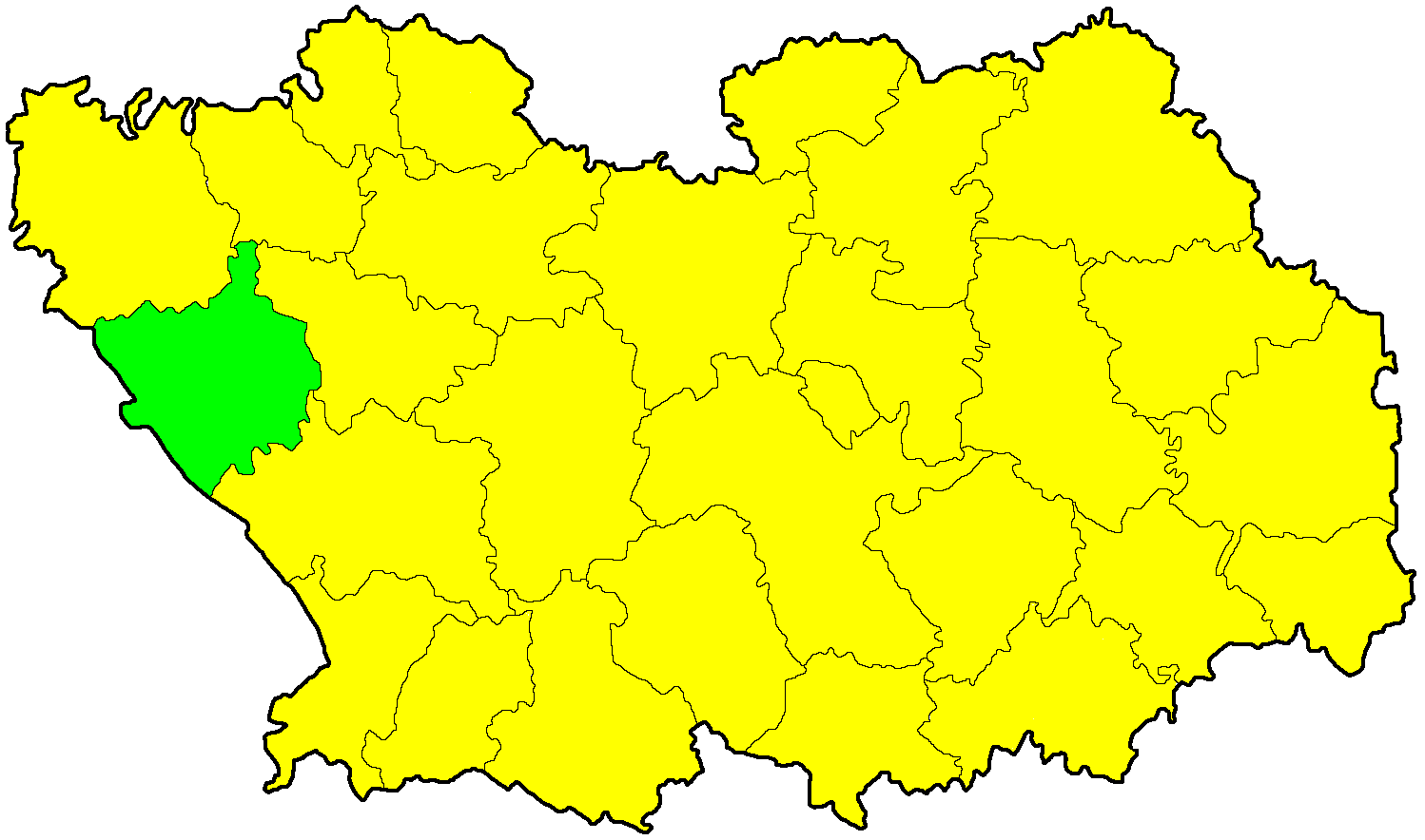 Bashmakovo district, Penza oblast, Russia